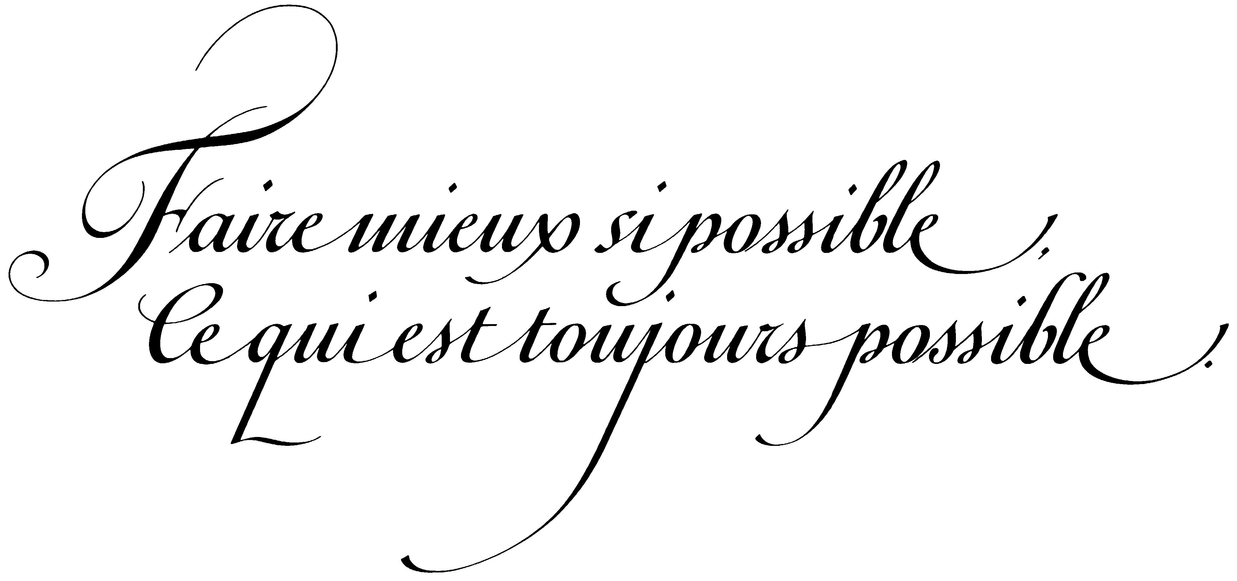 « 가능한 한 더욱 잘하라, 그것은 언제나 가능하다. » 1819, 프랑소와 콘스탄틴